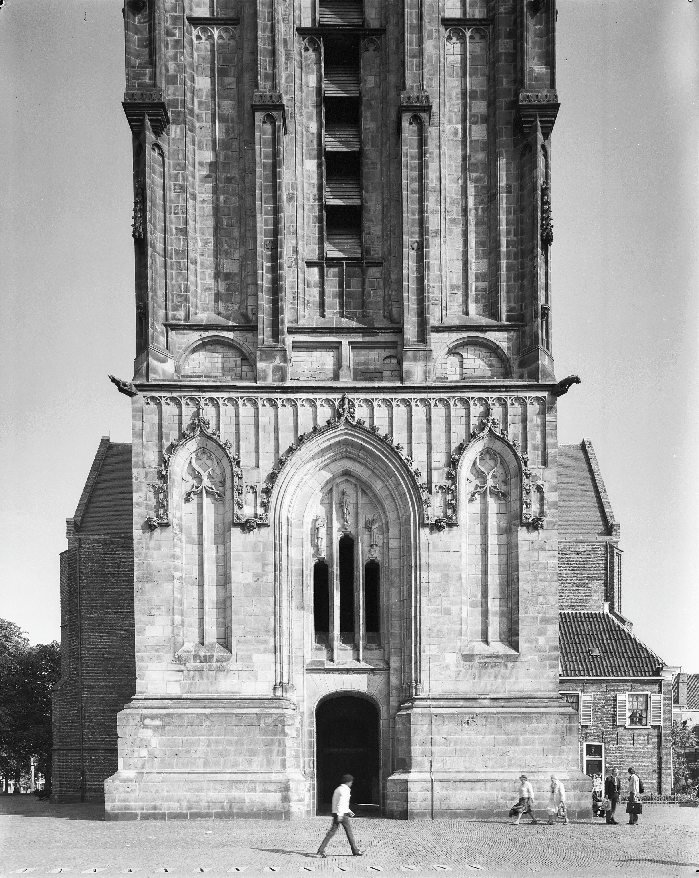 Martinikerk: ingangspartij westgevel